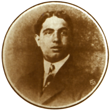 Abraham Valdelomar (1888-1919) escritor peruano, a los 22 años de edad.